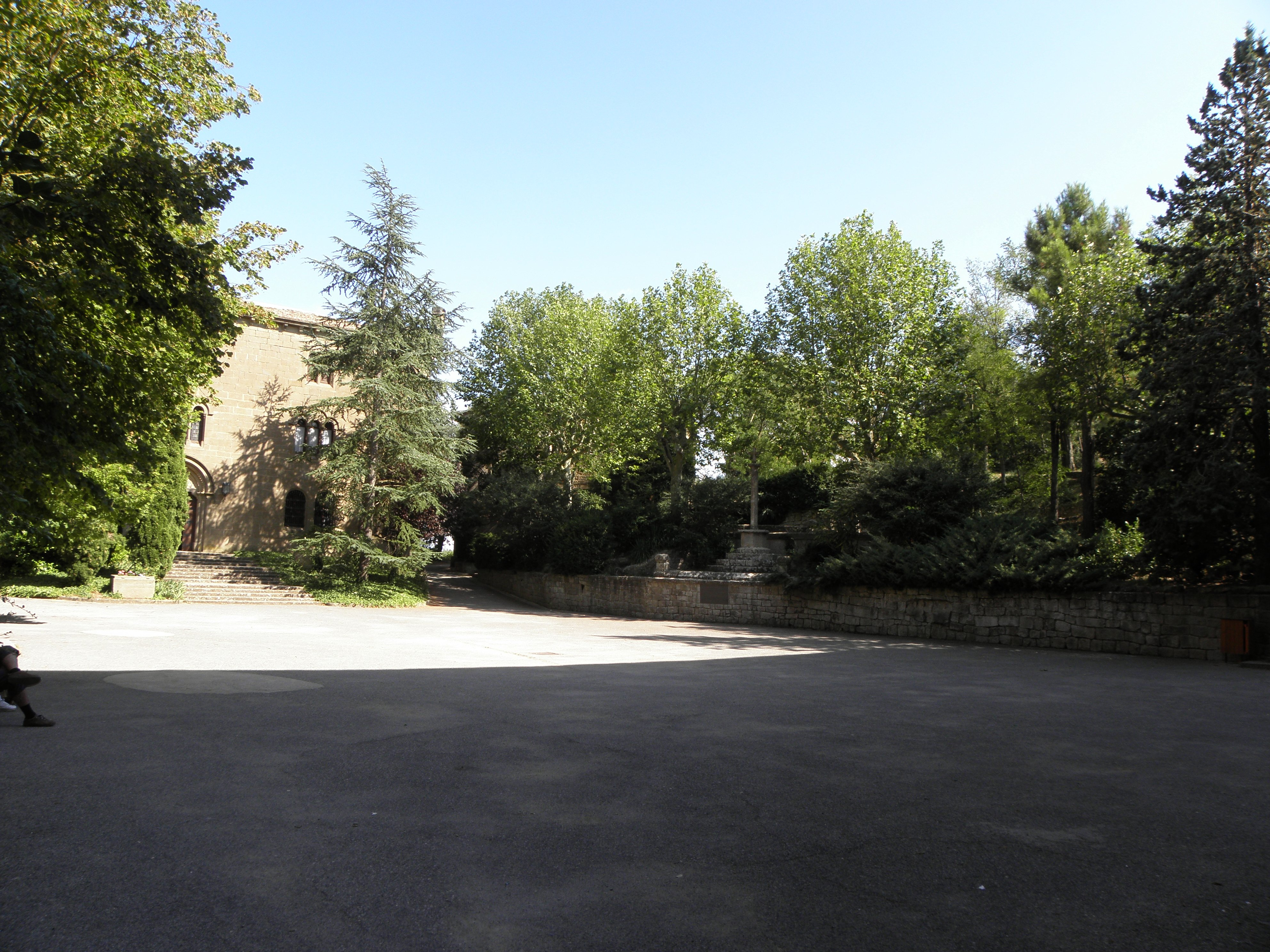 El costat sud la plaça del Miracle (Riner, Solsonès). A l'esquerra de la foto, la façana del monestir